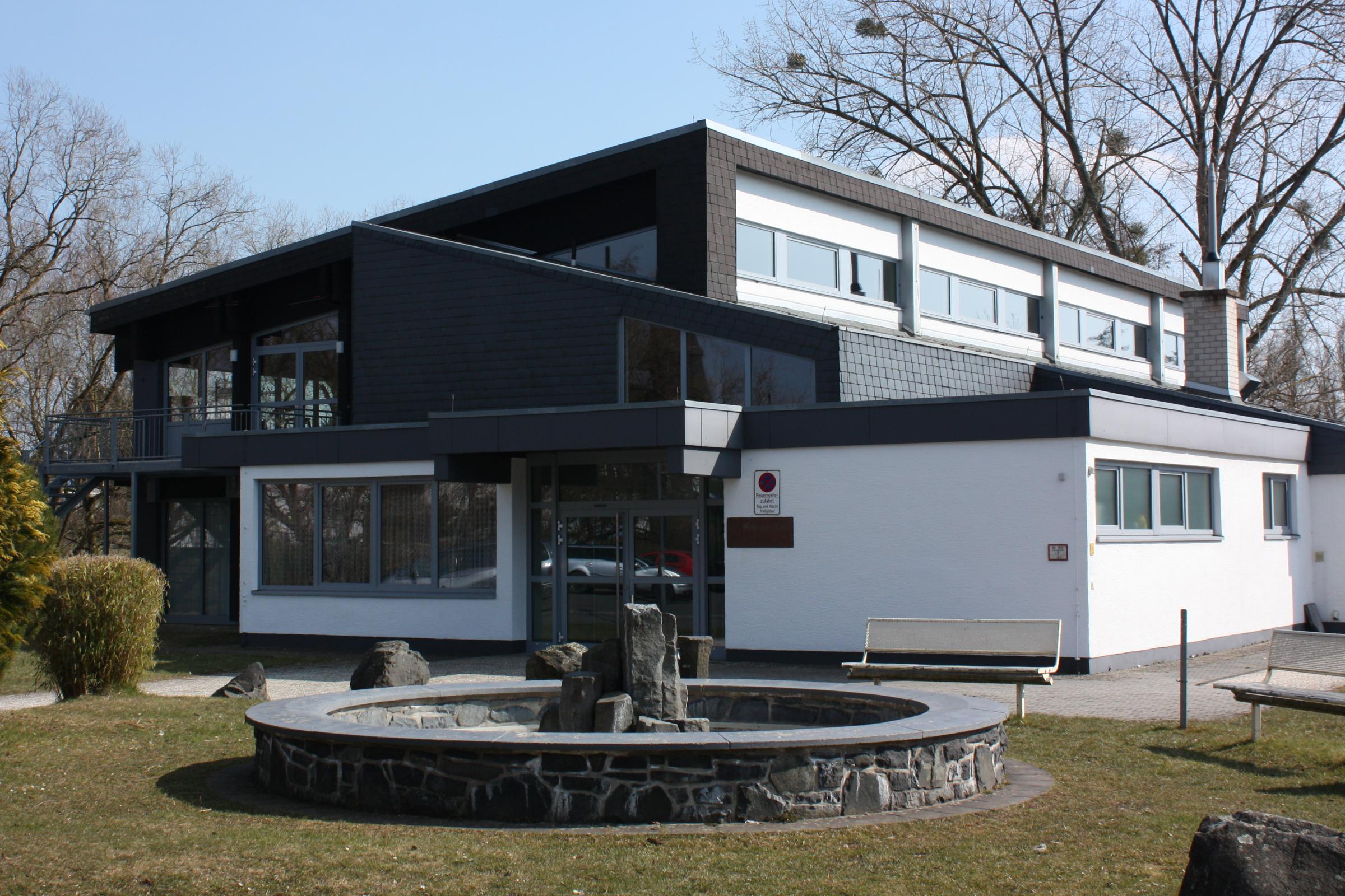 Dorfgemeinschaftshaus in Hausen, Westerwald (Waldbrunn), Hessen, Deutschland